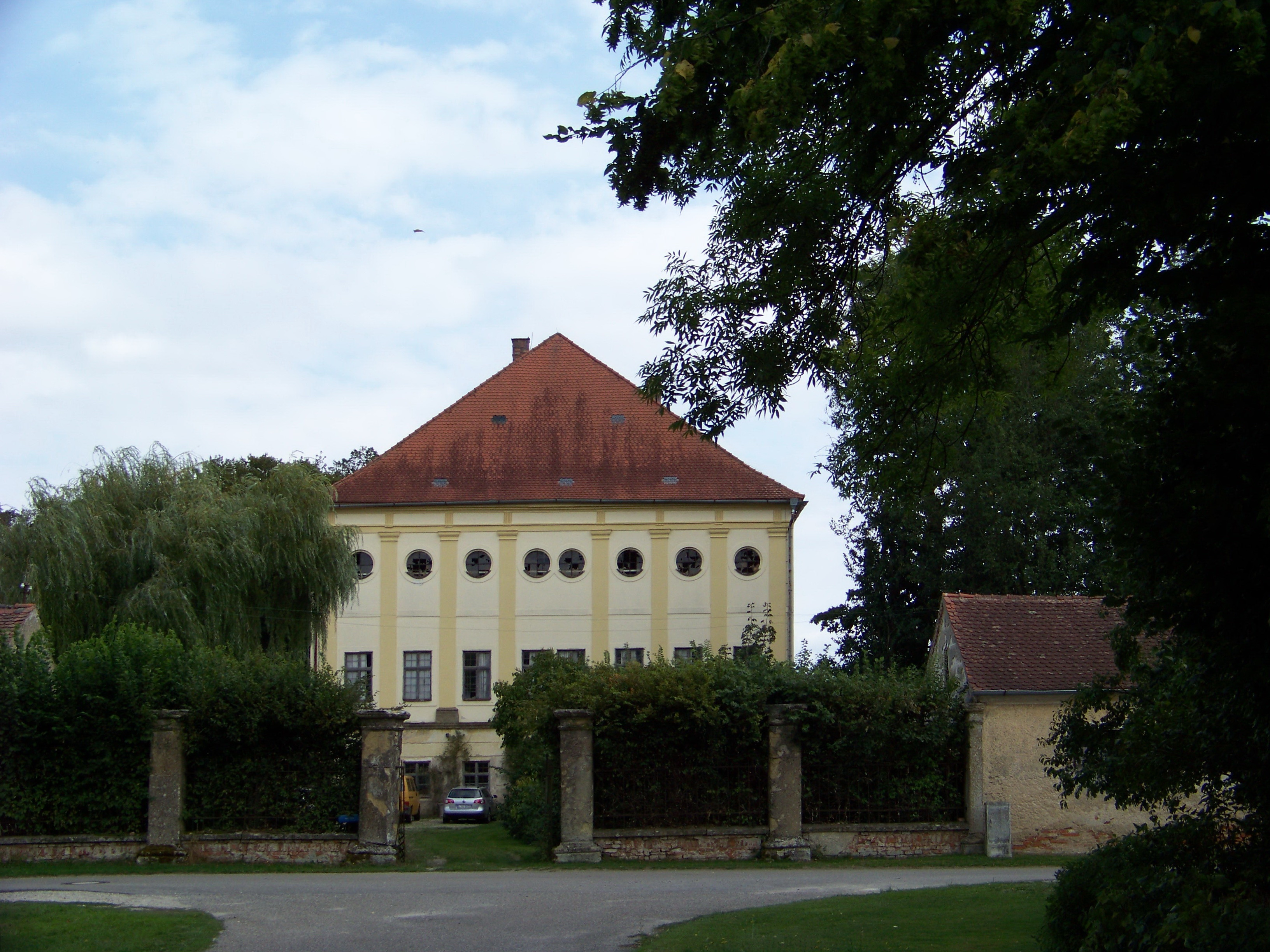 Mötzing, Schönach, Schlossstraße. Hauptgebäude dreigeschossiger Walmdachbau mit Pilastergliederung, 1702 wohl von Giovanni Antonio Viscardi; mit Ausstattung.